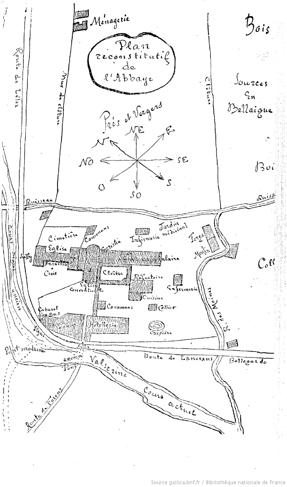 Reconstitution d'un plan de l'abbaye de Chézery (Ain, 1140-1793), effectuée par Jules Hannezo en 1921.